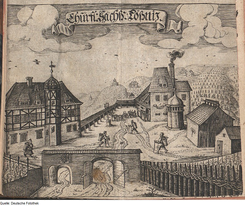 Original image description from the Deutsche FotothekWeinbau & Weingut & Sachsen